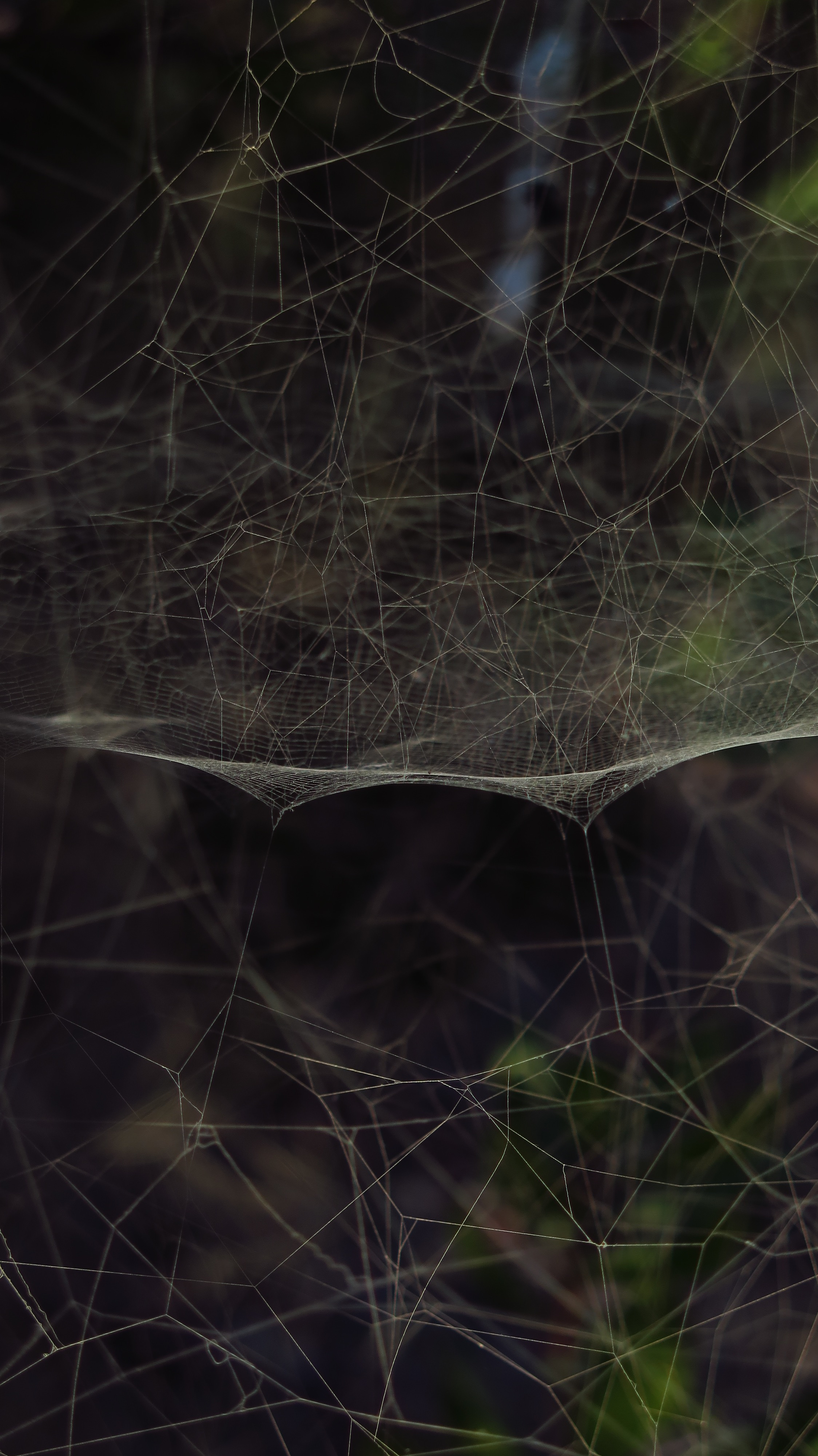 Vela Luka Insel Korcula Kroatien